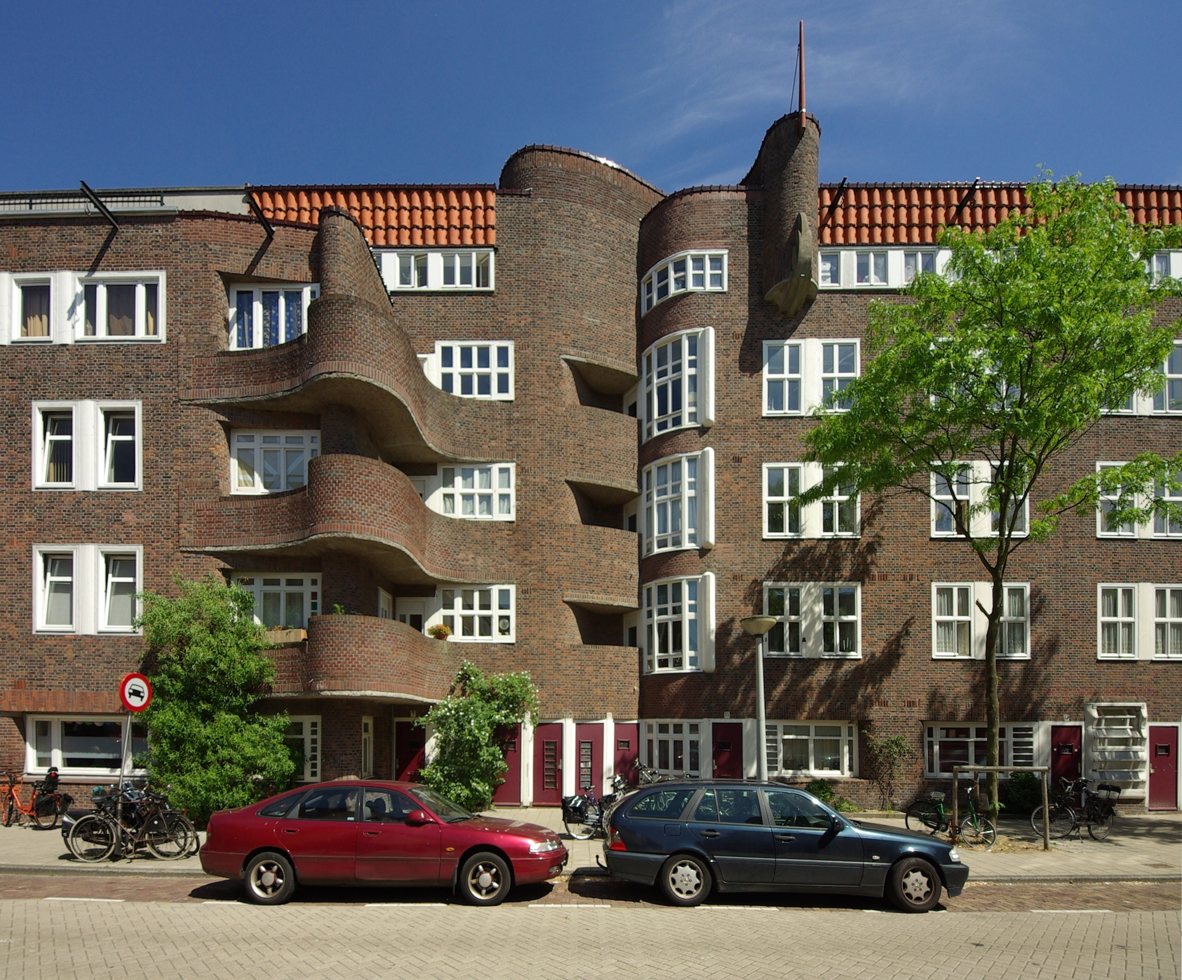 Woonhuis Holendrechtstraat 1-47 (1922/23), Amsterdam, architect: Margaret Staal-Kropholler